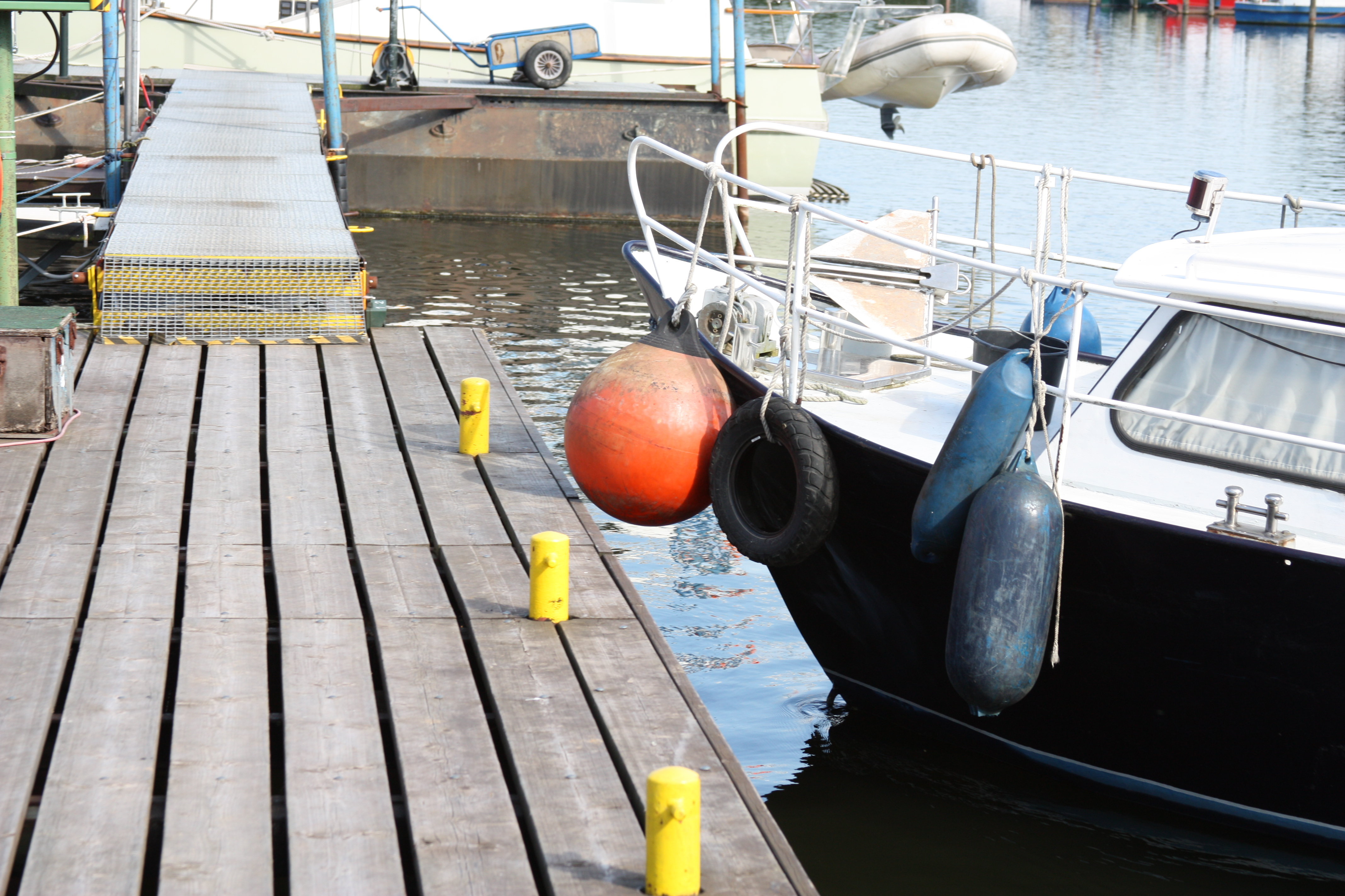 Anlegemanöver mit einem Motorboot; mit 45° langsam an den Steg fahren; mit Rückwärtsgang das heck an den Steg ziehen